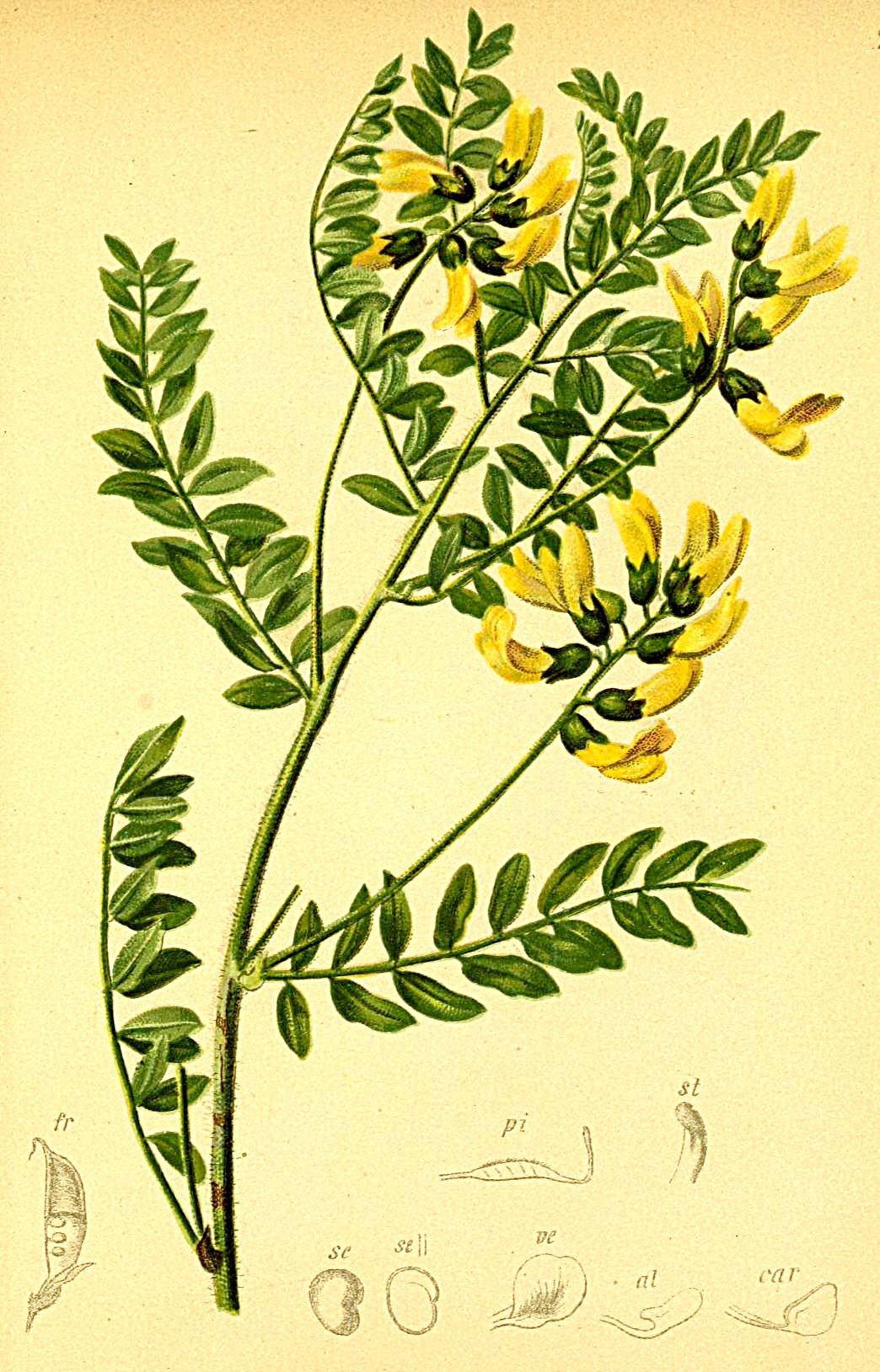 Astragalus penduliflorus (Phaca alpina)